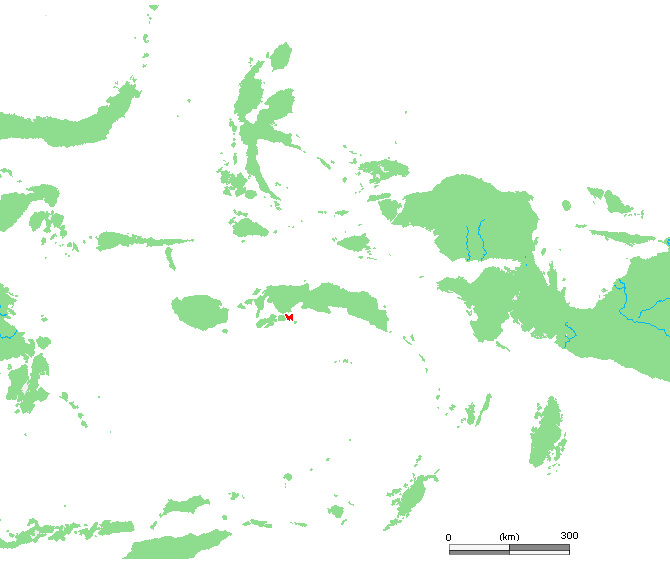 ID Saparua.PNG